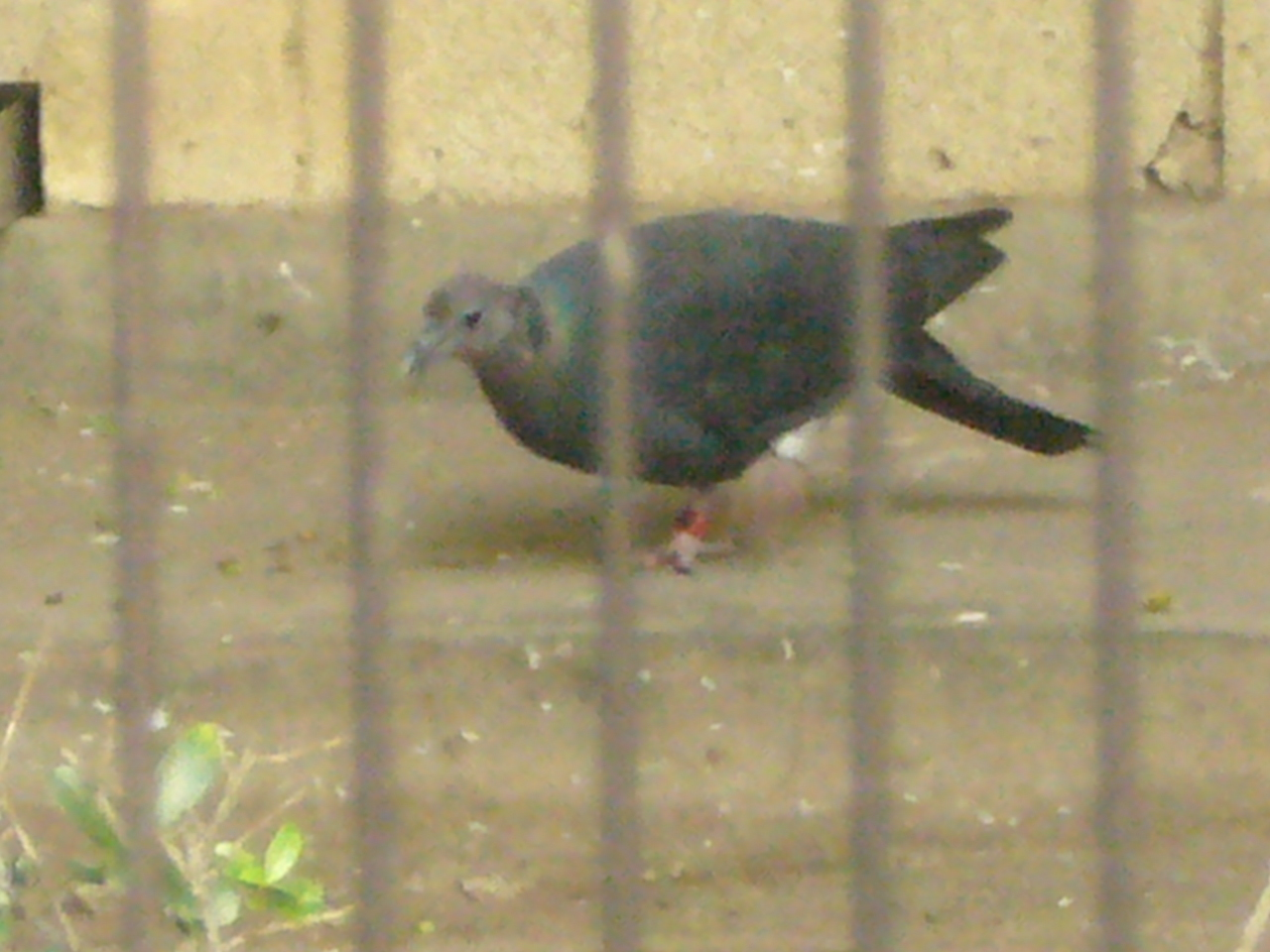 自己撮影画像 撮影者:岐部 博 撮影:利用者:ｋａｔｕｕｙａ 撮影日:2007年12月02日 撮影場所:恩賜上野動物園 和名:アカガシラカラスバト